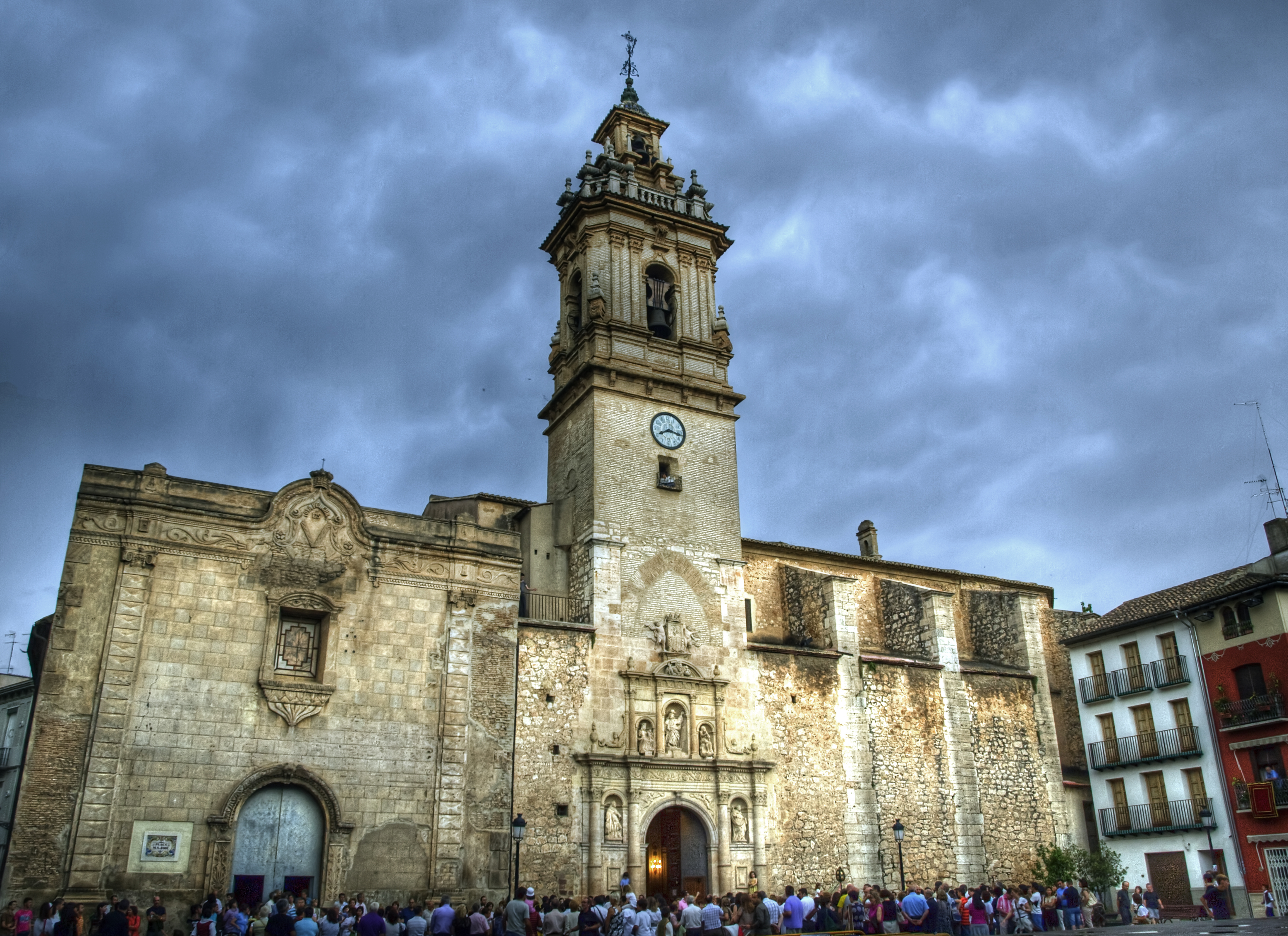 Iglesia parroquial de San Jaime Apóstol